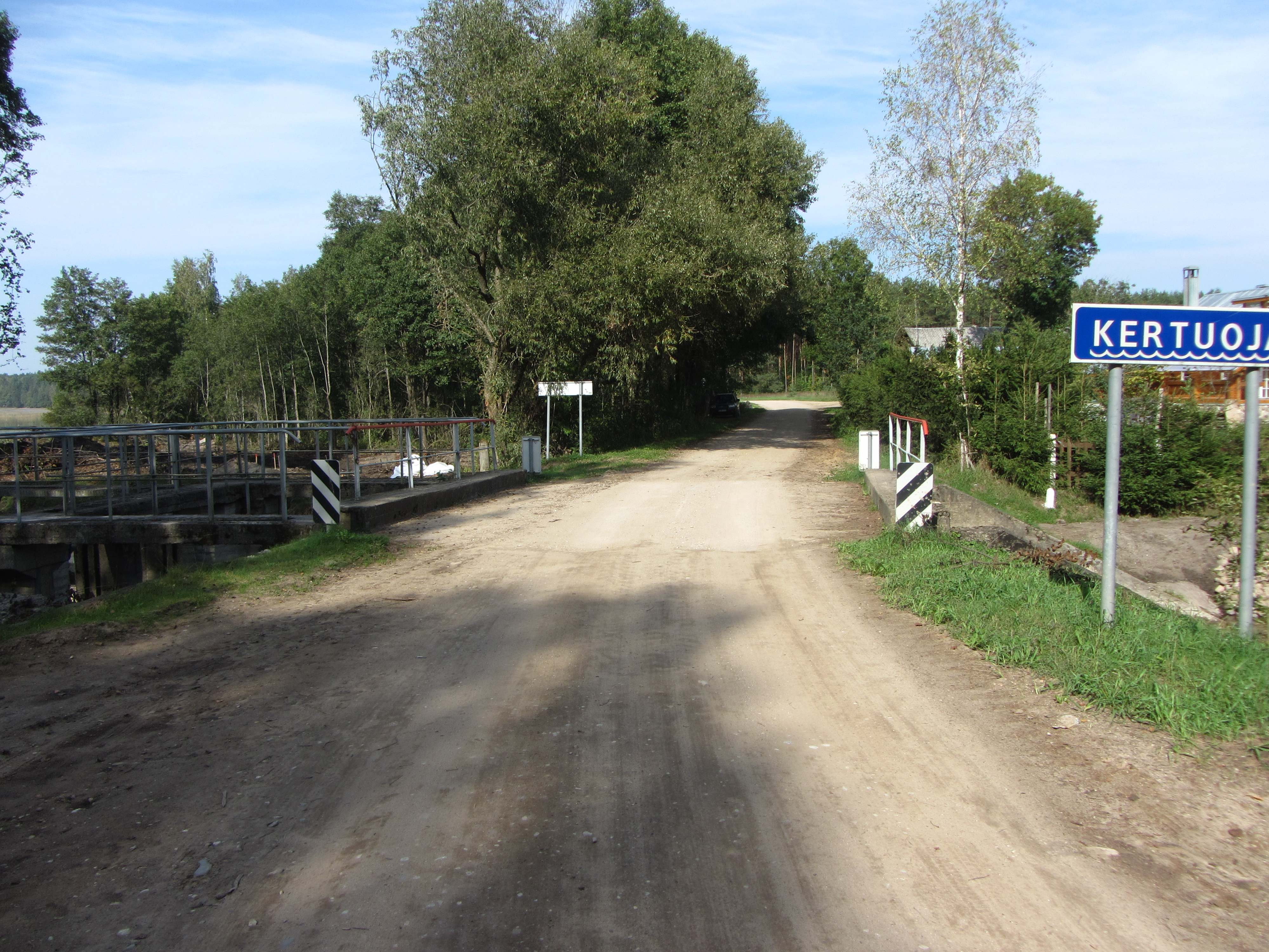 Kertuoja 33218, Lithuania